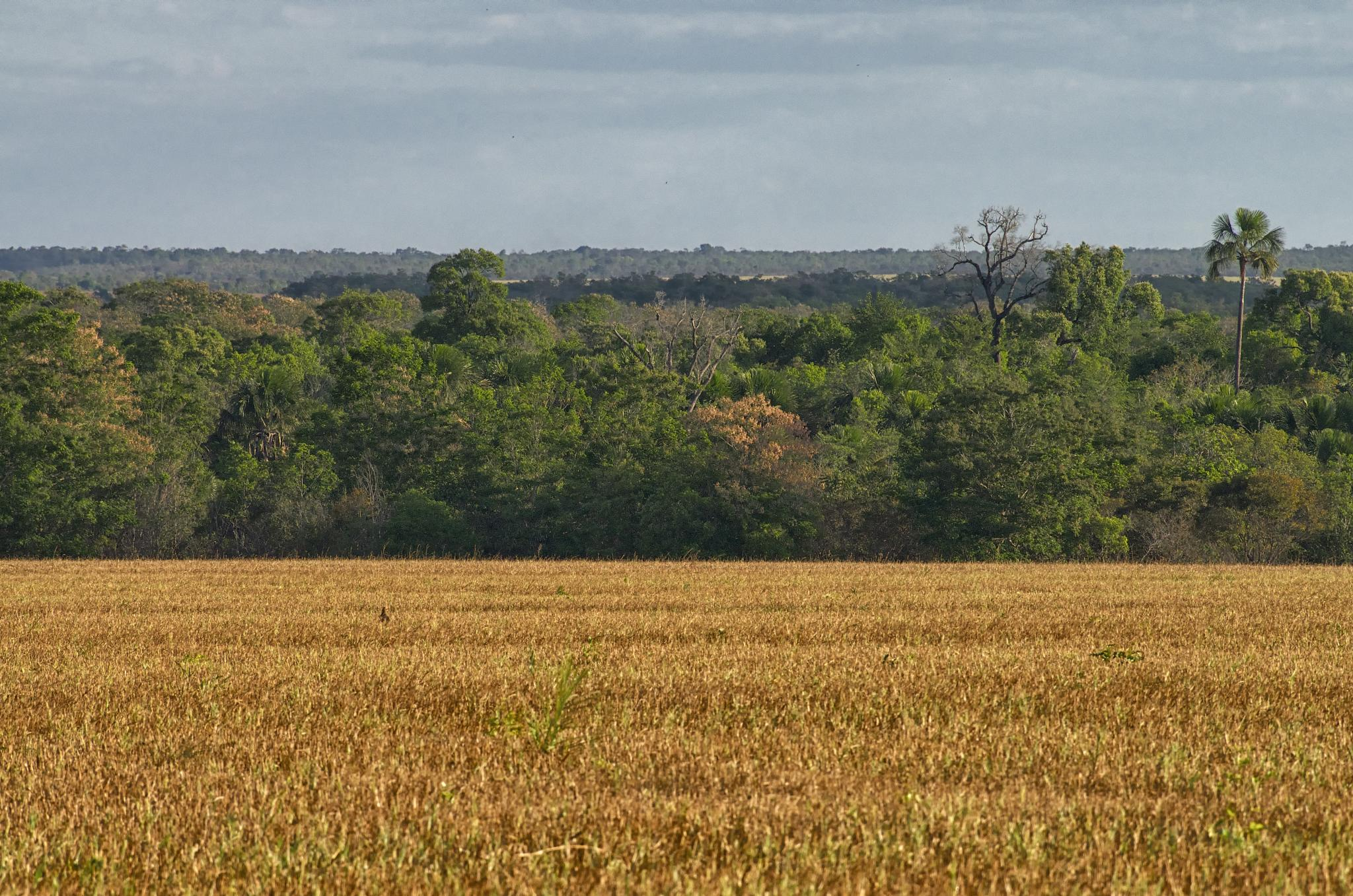 Gerais de Balsas